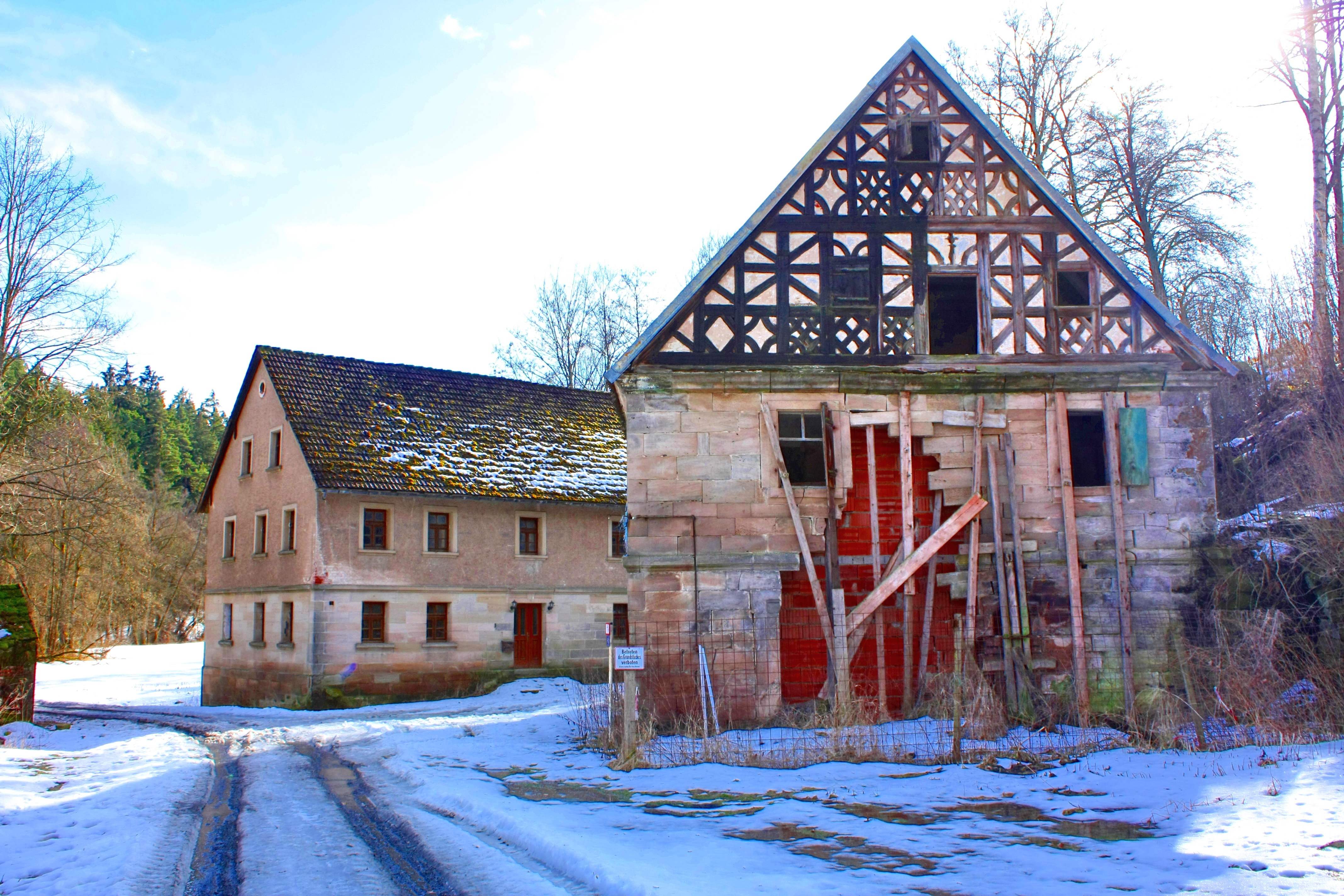 Eimersmühle bei Creußen in Oberfranken, Denkmal D-4-72-127-86